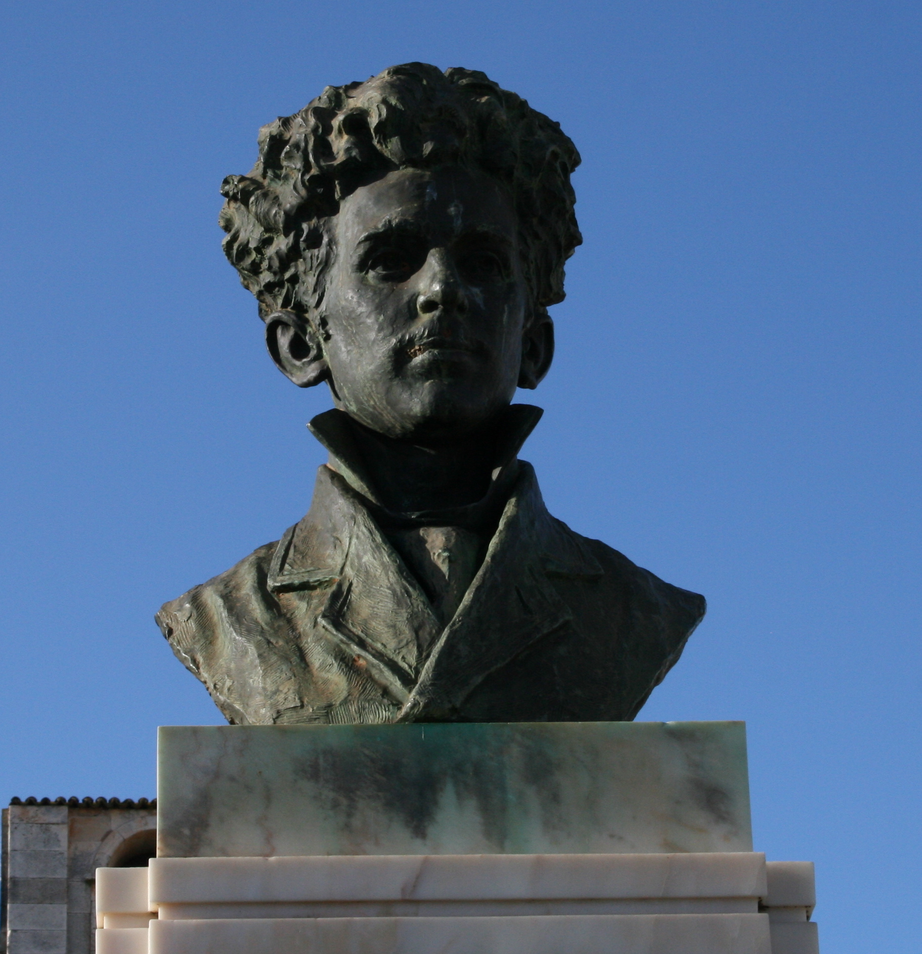 Busto do pintor Henrique Pousão na sua terra natal, Vila Viçosa